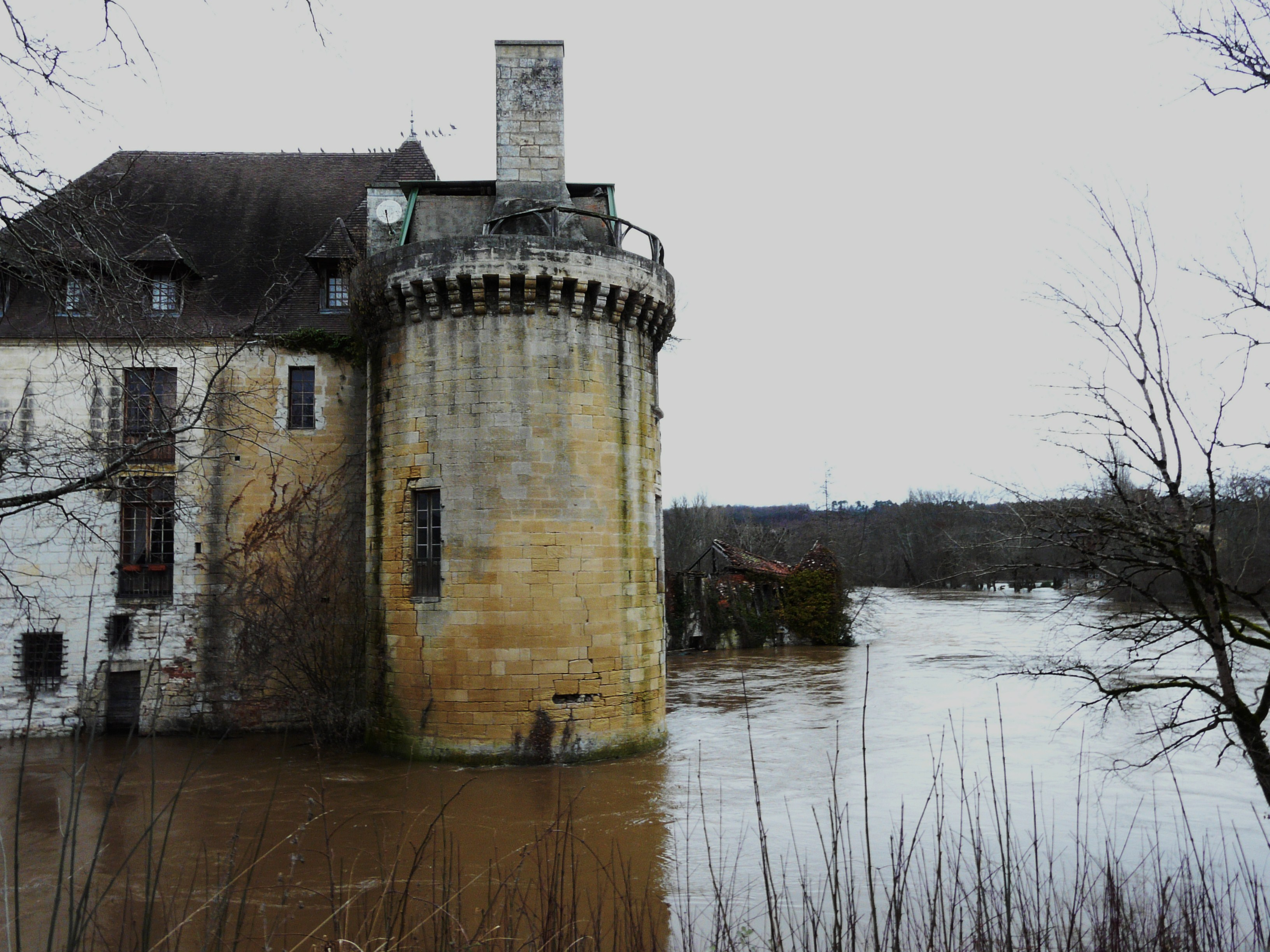 La façade sud-est du château de Rognac lors des crues de l'Isle, Bassillac, Dordogne, France